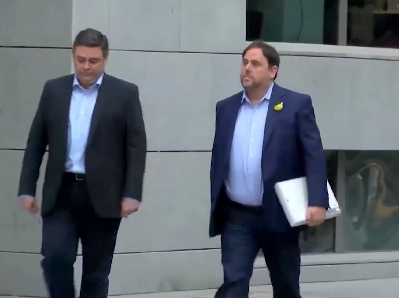 La jueza de la Audiencia Nacional Carmen Lamela ha acordado enviar a prisión sin fianza a Oriol Junqueras y a otros siete consellers que han comparecido este jueves, acusados de rebelión, sedición y malversación de fondos públicos.